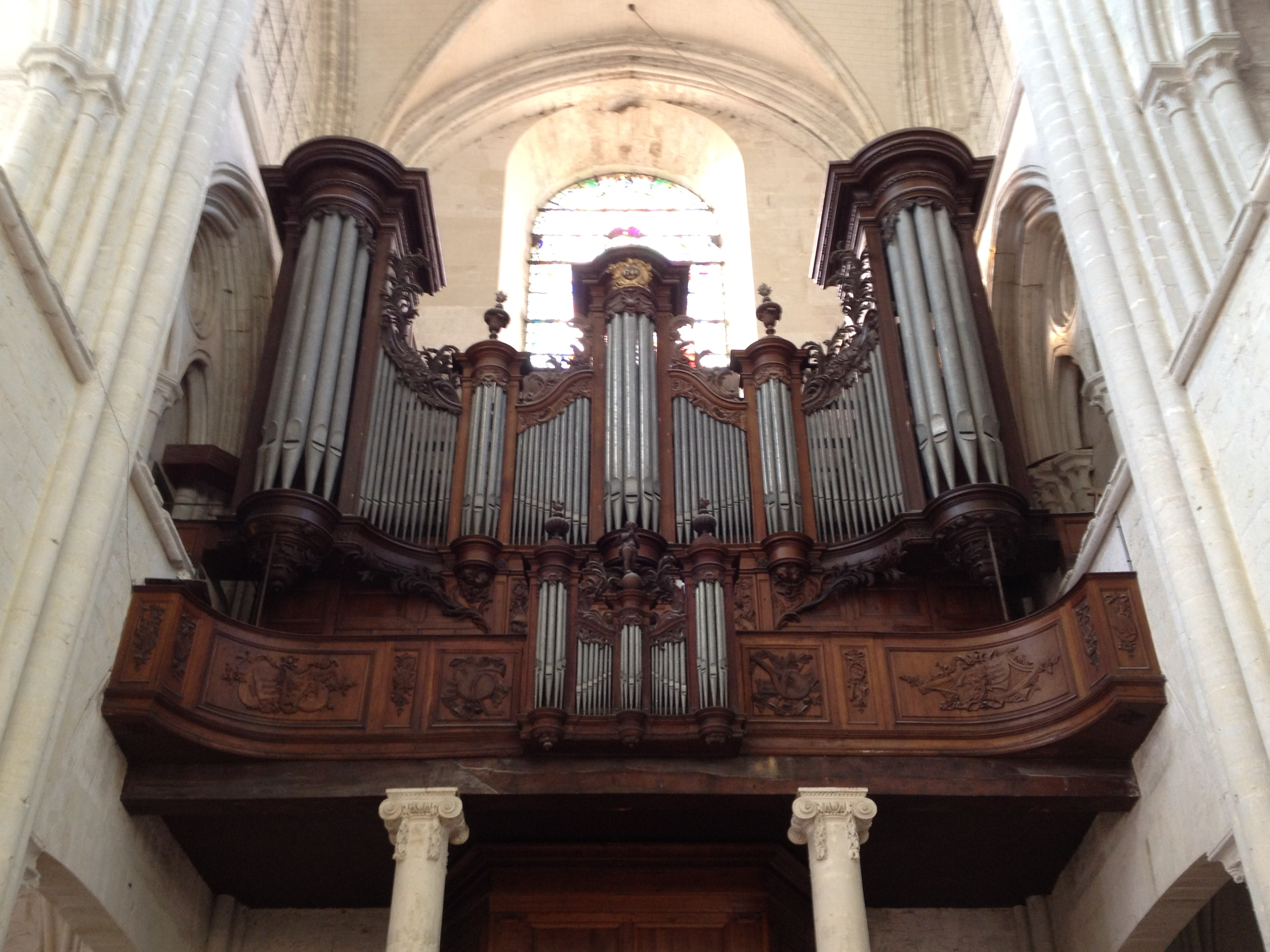 Fécamp, abbatiale de la Trinité, orgue construit en 1746 par Louis & Jean-Baptiste-Nicolas Lefebvre pour l'abbaye de Montivilliers; transféré à Fécamp par Huet en 1793; instrument reconstruit en 1883 par Aristide Cavaillé-Coll qui ajoute les tourelles et plates-faces extrêmes, restauré par Jean-Marc Cicchero en 1997.